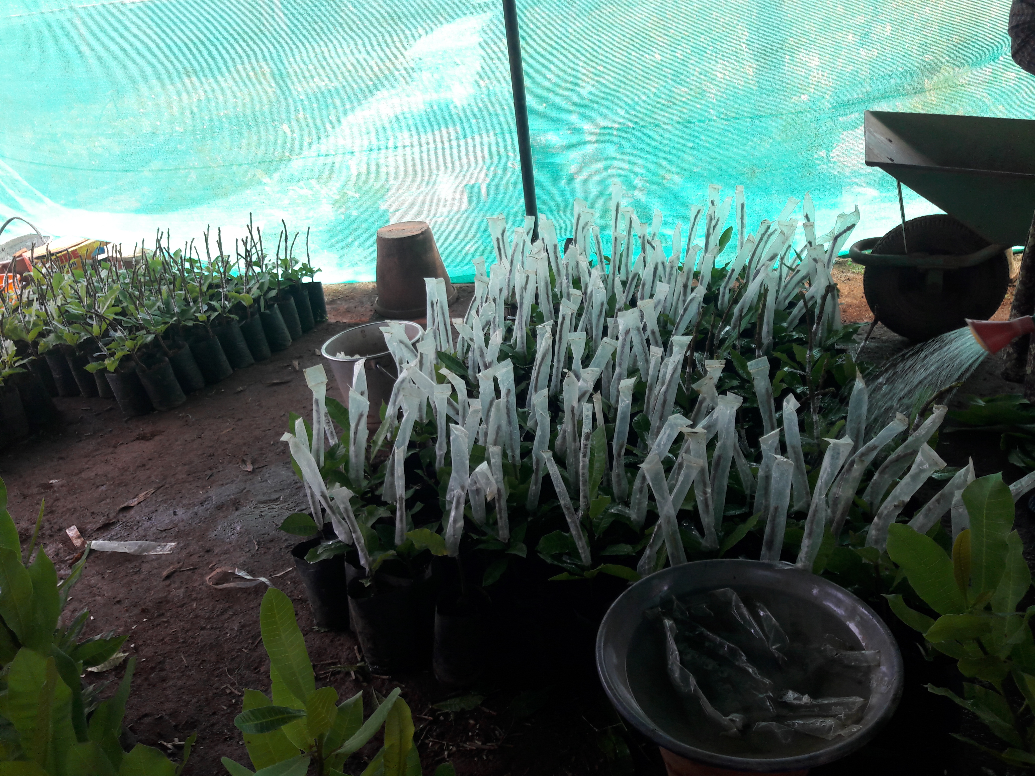 മാടക്കത്തറ കശുമാവ് ഗവേഷണ കേന്ദ്രത്തില്‍ ഗ്രാഫ്റ്റ് ചെയ്ത് വെച്ചിരിക്കുന്ന അത്യുല്‍പ്പാദന ശേഷിയുള്ള കശുമാവ് തൈകള്‍.ശാസ്ത്രീയനാമം Anacardium occidentale കുടുംബം Anacardiaceae.